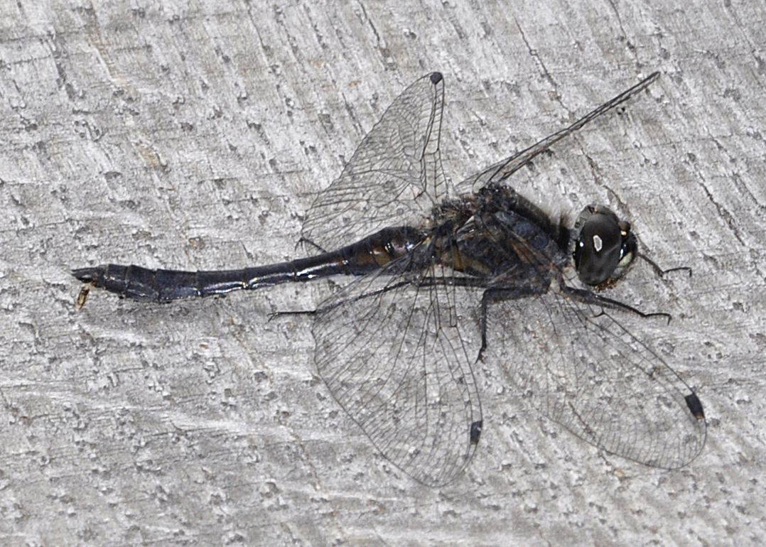 Germany: Niedersachsen, Solling mountains, Mecklenbruch near Silberborn, 08 September 2013. Species: Sympetrum danae. Photo: F. Welter-Schultes